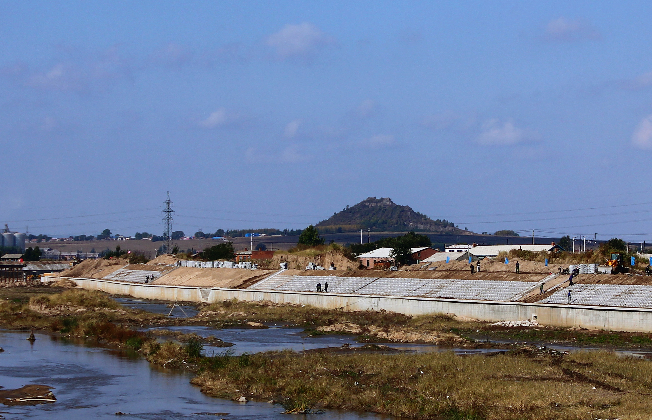 吉林省伊通满族自治县西尖山与伊通河